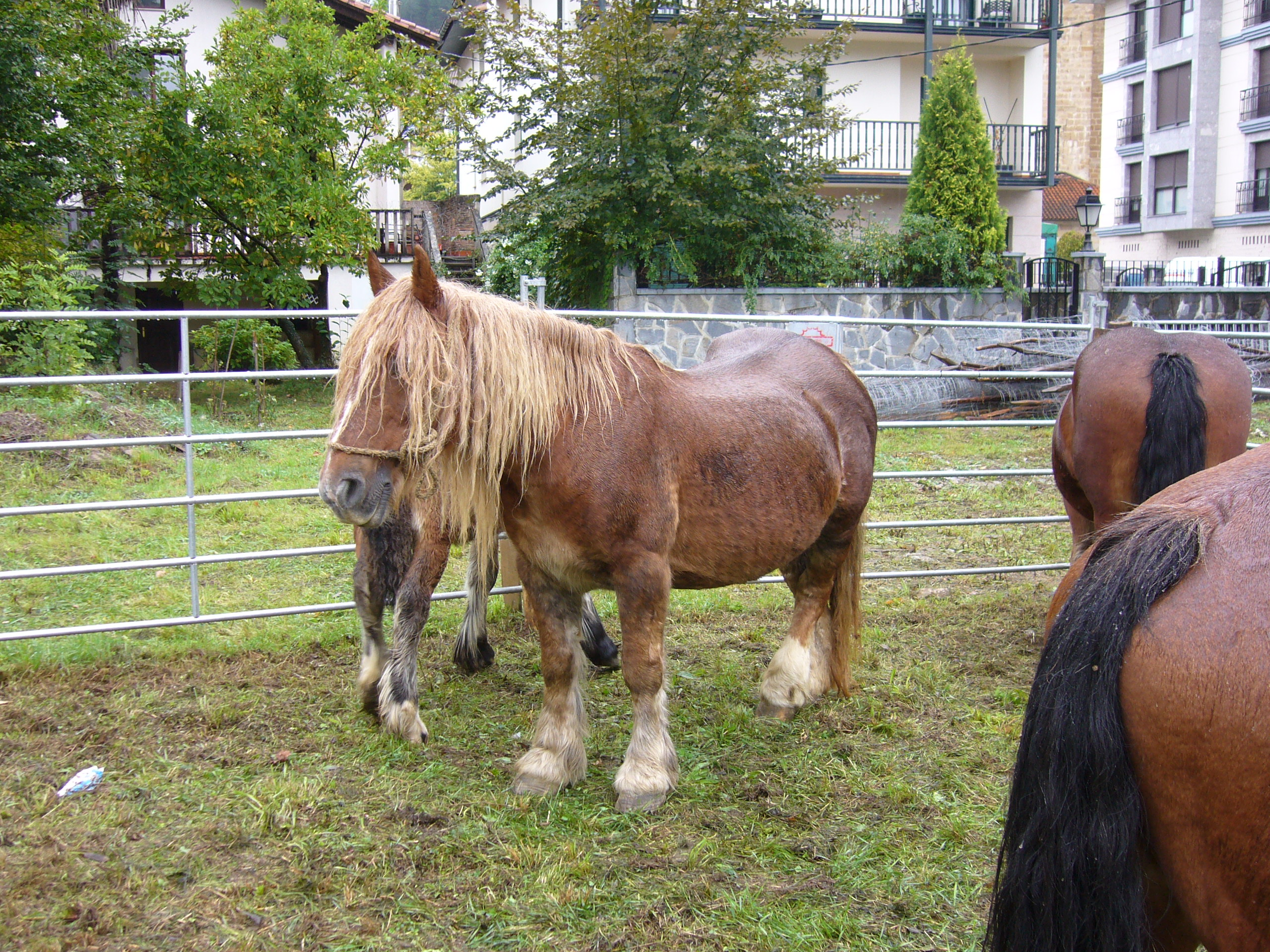 Auritzeko zaldia, arra, 2010eko Ormaiztegiko azokan.